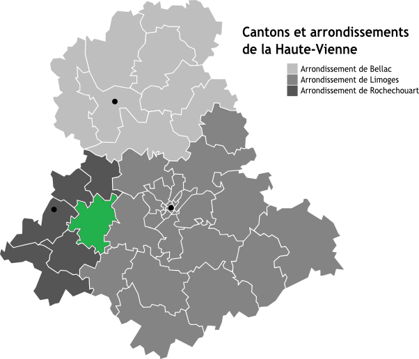 Canton de Saint-Laurent-sur-Gorre, Limousin, France en Carte des arrondissements de la Haute-Vienne